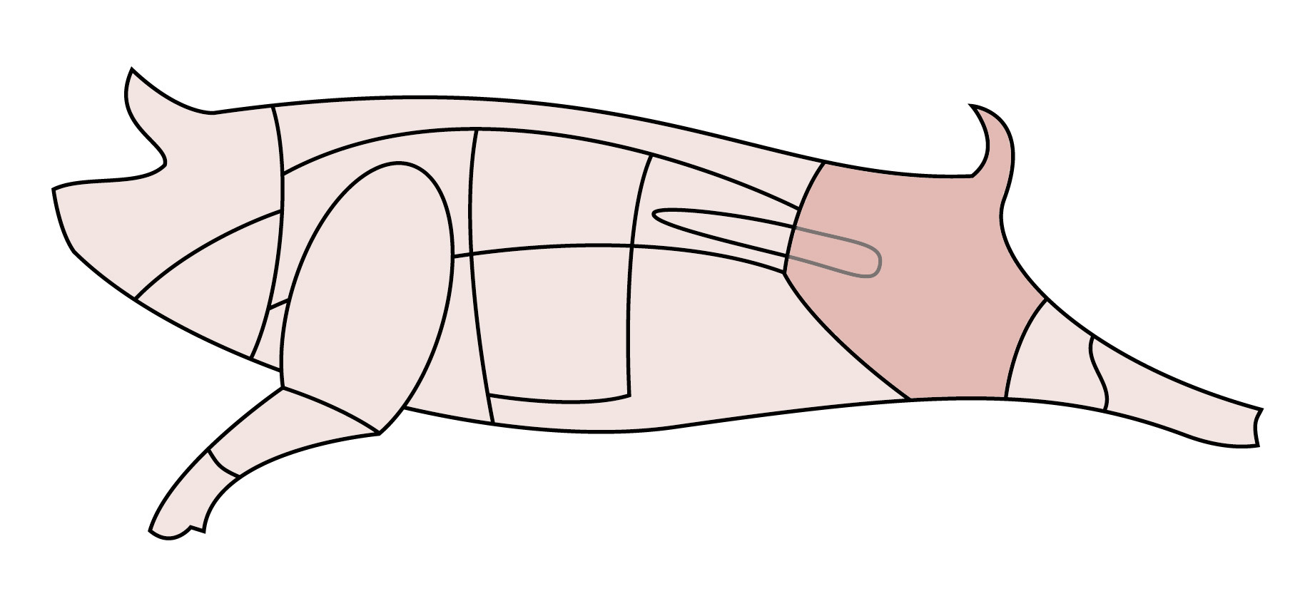 Schematische Darstellung eines Schweins, Schinken. Eigene Zeichnung. GNU-FDL